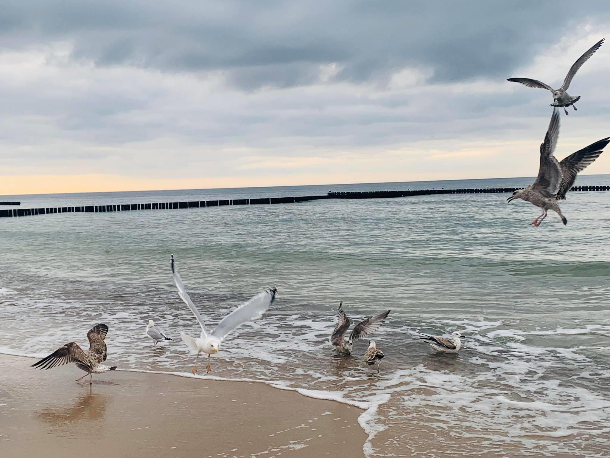 Mewy na plaży w Jarosławcu